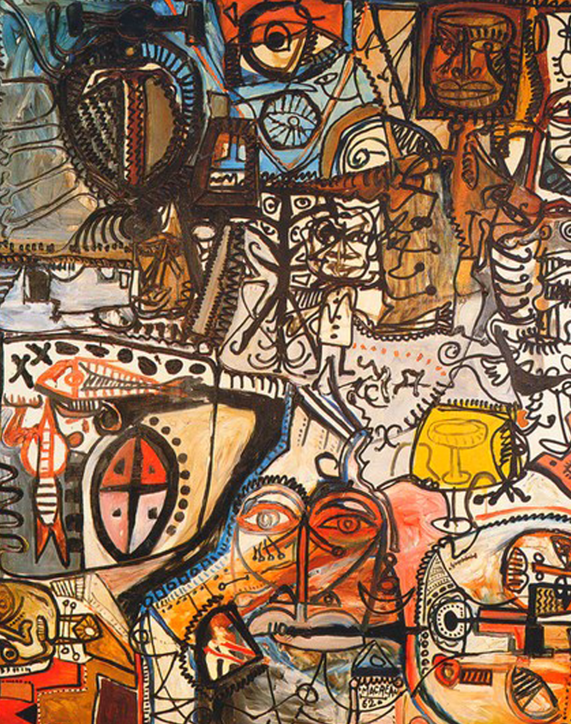 Photo d'une oeuvre sur toile de Michel Macréau